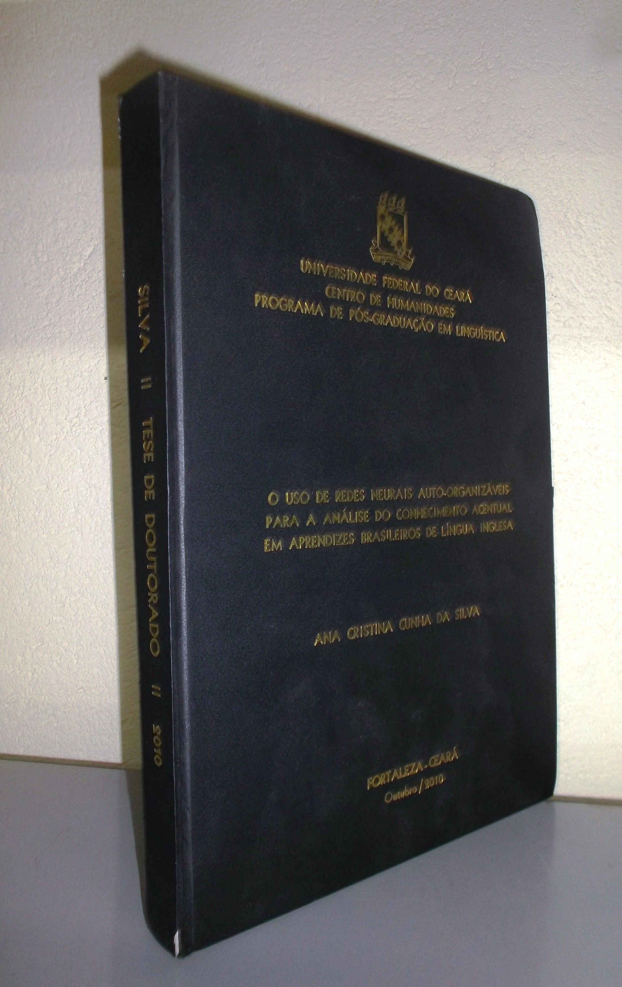 Tese de doutorado, Universidade Federal do Ceará, em uma biblioteca universitária.